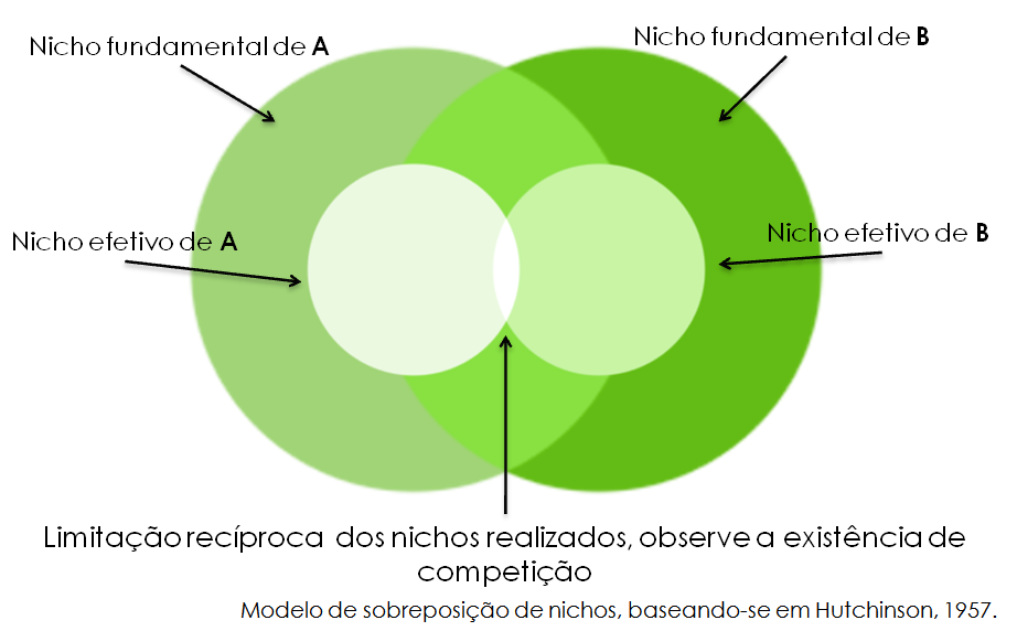 Limitação recíproca de nichos realizados